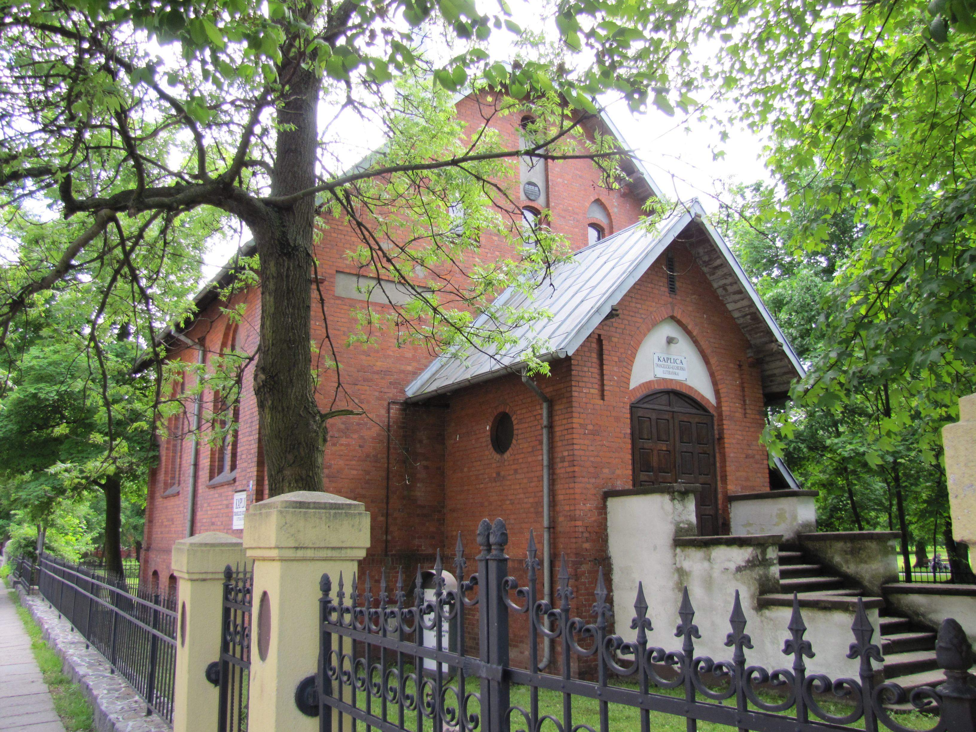 Kaplica Luterańska.